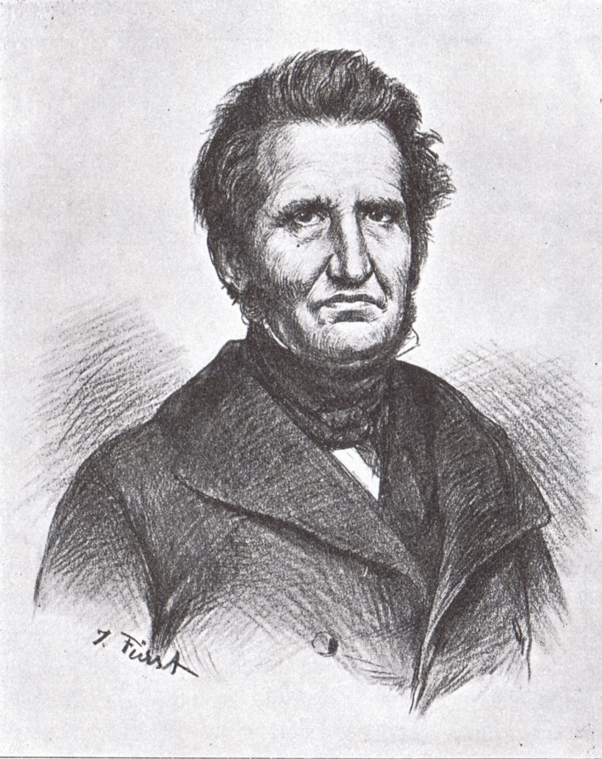 Friedrich Christoph Dahlmann (1785-1860), deutscher Historiker und Staatsmann, Zeichnung von Julius Fürst um 1895